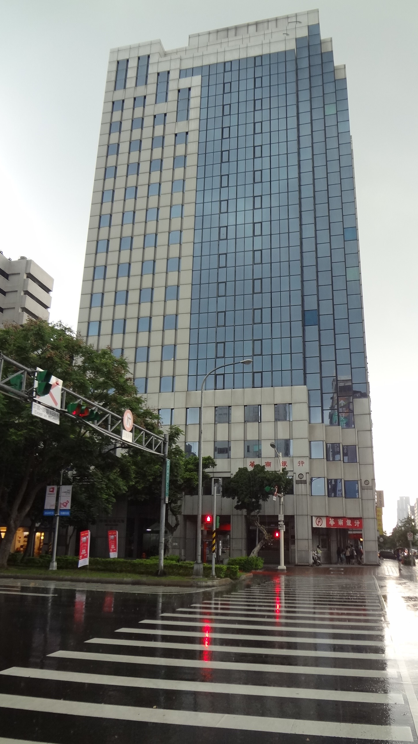 裕隆企業大樓，曾經是裕隆汽車、中華汽車與台元紡織總部所在地，地址：臺北市大安區敦化南路二段2號。1樓為華南商業銀行敦化分行。